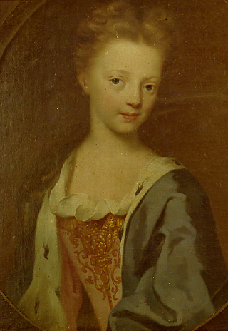 Charlotte Amalie zur Lippe-Brake, Gräfin. Tochter des Grafen Rudolf (1692 - 1703).